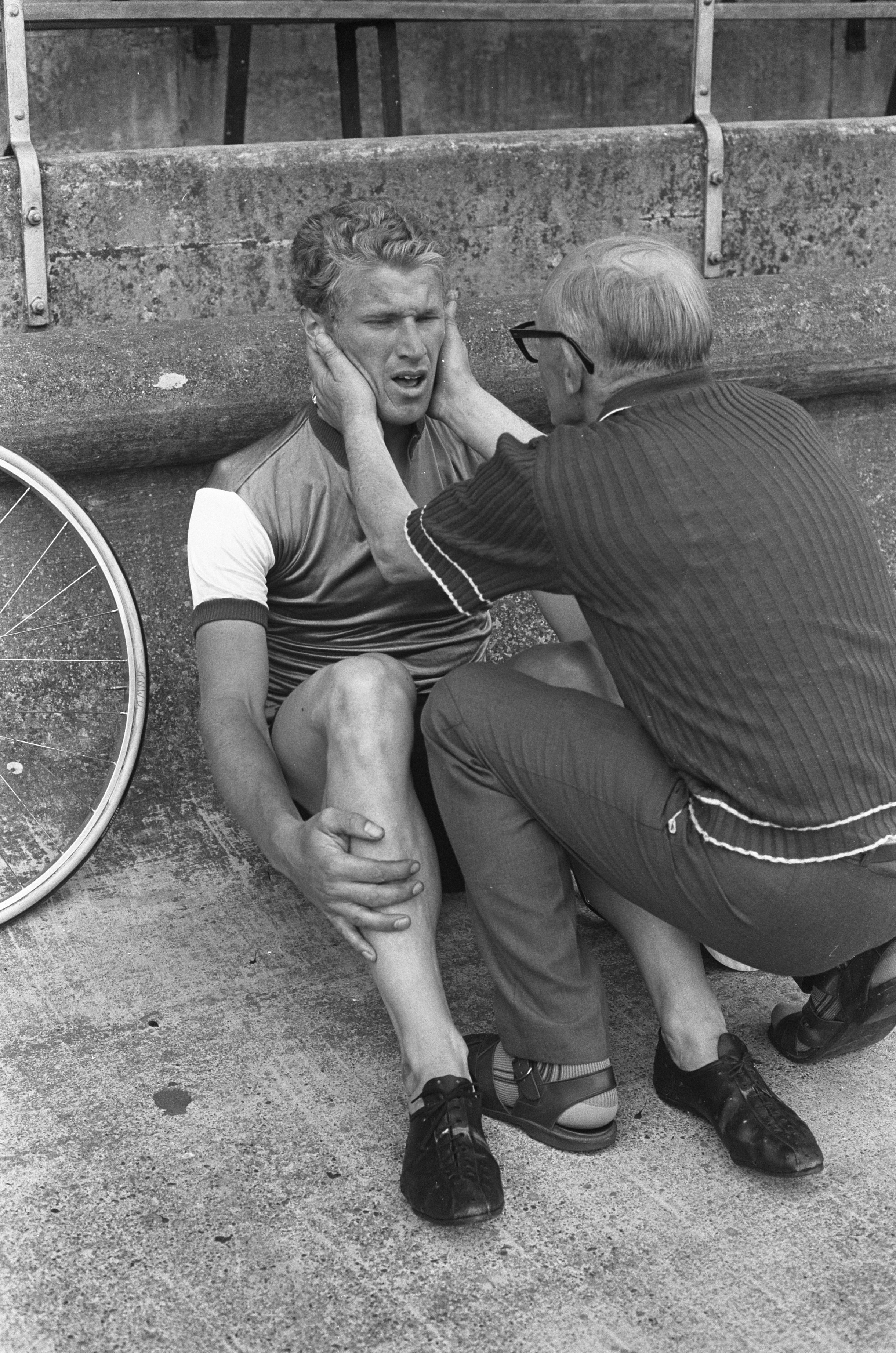 Collectie / Archief : Fotocollectie Anefo Reportage / Serie : [ onbekend ] Beschrijving : Nederlands kampioenschap Wielrennen tijdrit 1 kilometer voor amateurs in Olympisch Stadion, winnaar Peter van Doorn na zijn rit, nummer 8 Van Doorn in aktie / Datum : 20 juli 1972 Trefwoorden : wielrennen Persoonsnaam : Doorn, Peter van Fotograaf : Punt, […] / Anefo Auteursrechthebbende : Nationaal Archief Materiaalsoort : Negatief (zwart/wit) Nummer archiefinventaris : bekijk toegang 2.24.01.05 Bestanddeelnummer : 925-7553